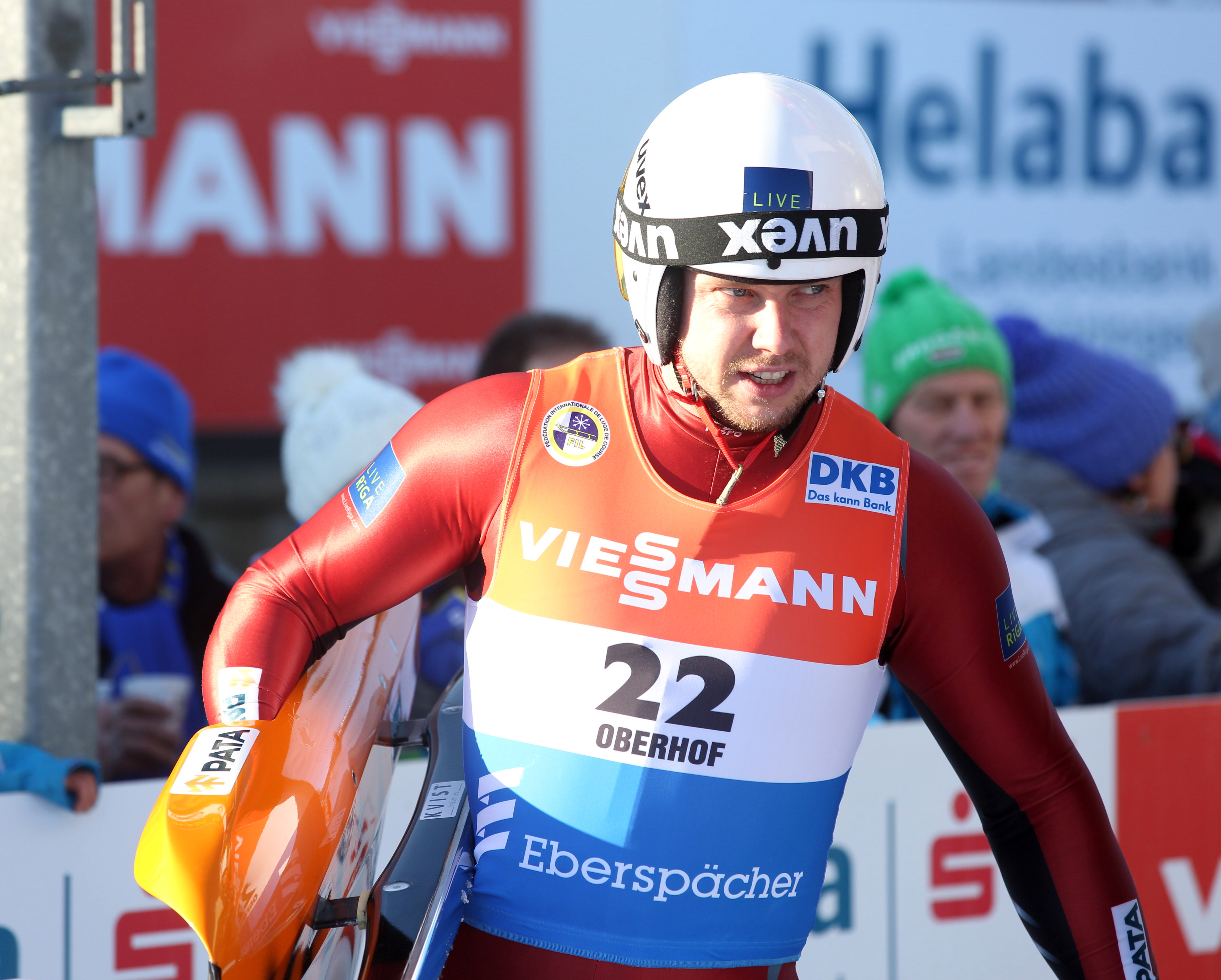 Juris Šics beim Worldcup Doppelsitzer Männer Oberhof 2017